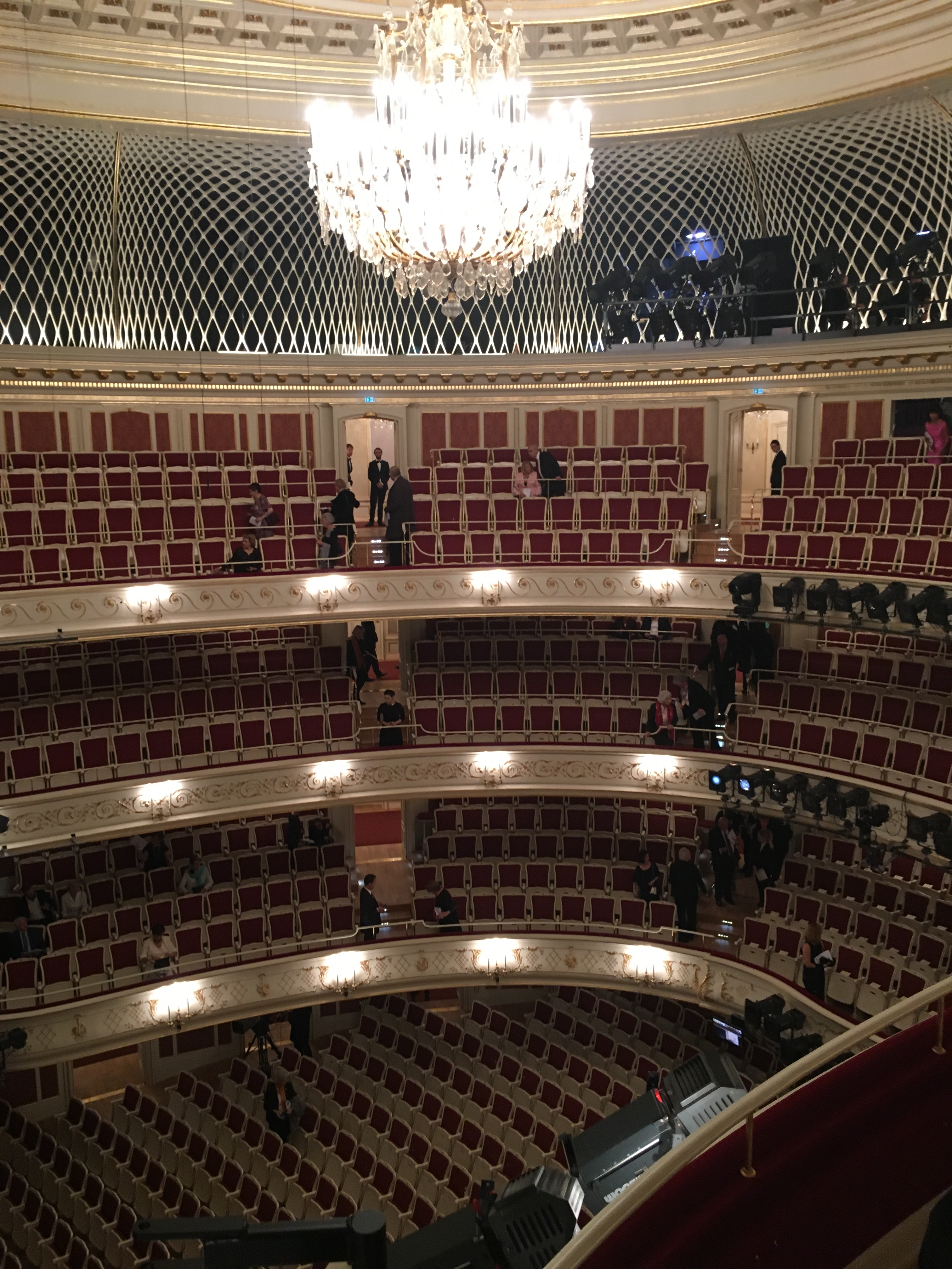 Zuschauerraum der Staatsoper am Tag der Wiedereröffnung am 03. Oktober 2017